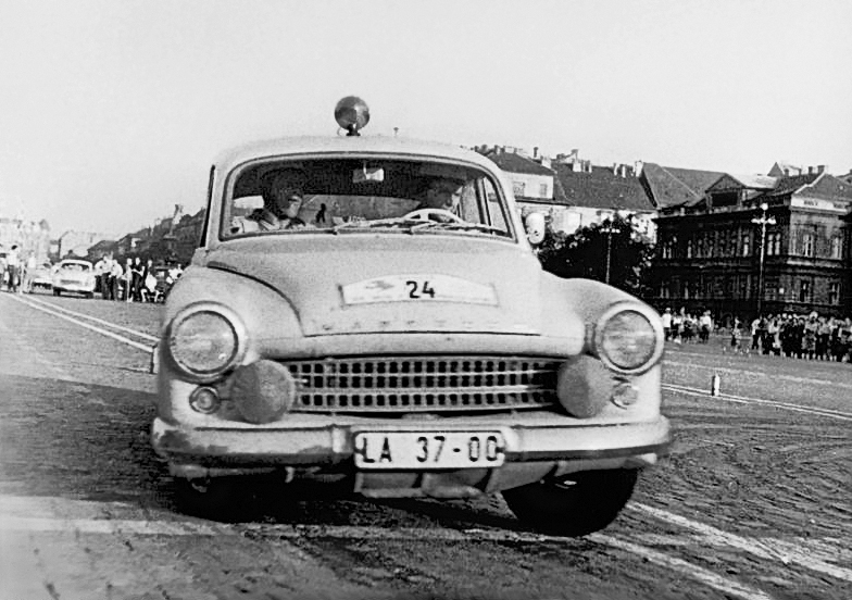 III. Internationale Automobil-Rallye "Für Frieden und Freundschaft" 72 Fahrzeuge aus der Sowjetunion, Volkspolen, der CSSR, der DDR, Bulgarien und Ungarn bestreiten die über 5000 km führende III. Internationale Automobil-Rallye "Für Frieden und Freundschaft" vom 2.-7. September 1962. Die Strecke führt vom Startort Tihany am Plattensee durch Ungarn, die CSSR, bis zum Wendepunkt Kiew und von dort durch Volkspolen, nochmals durch die CSSR bis zum Endziel Dresden. Am 6. September erreichen die Fahrzeuge die Oder-Neiße-Friedensgrenze bei Görlitz, um von dort aus die letzten 850 km durch das Gebiet unserer Republik in Angriff zu nehmen. Eine Sonderprüfung auf dem Dresdener Altmarkt beschließt am Nachmittag des 7. September diese Friedensfahrt der Motorsportler. UBz: Kurt Otto- Hermann Hanf. Die "Meister des Sports" vom MC Eisenach waren im Vorjahr Klassensieger und 3. der Gesamtwertung. Auch in diesem Jahr sind die Eisenacher wieder mit von der Partie."